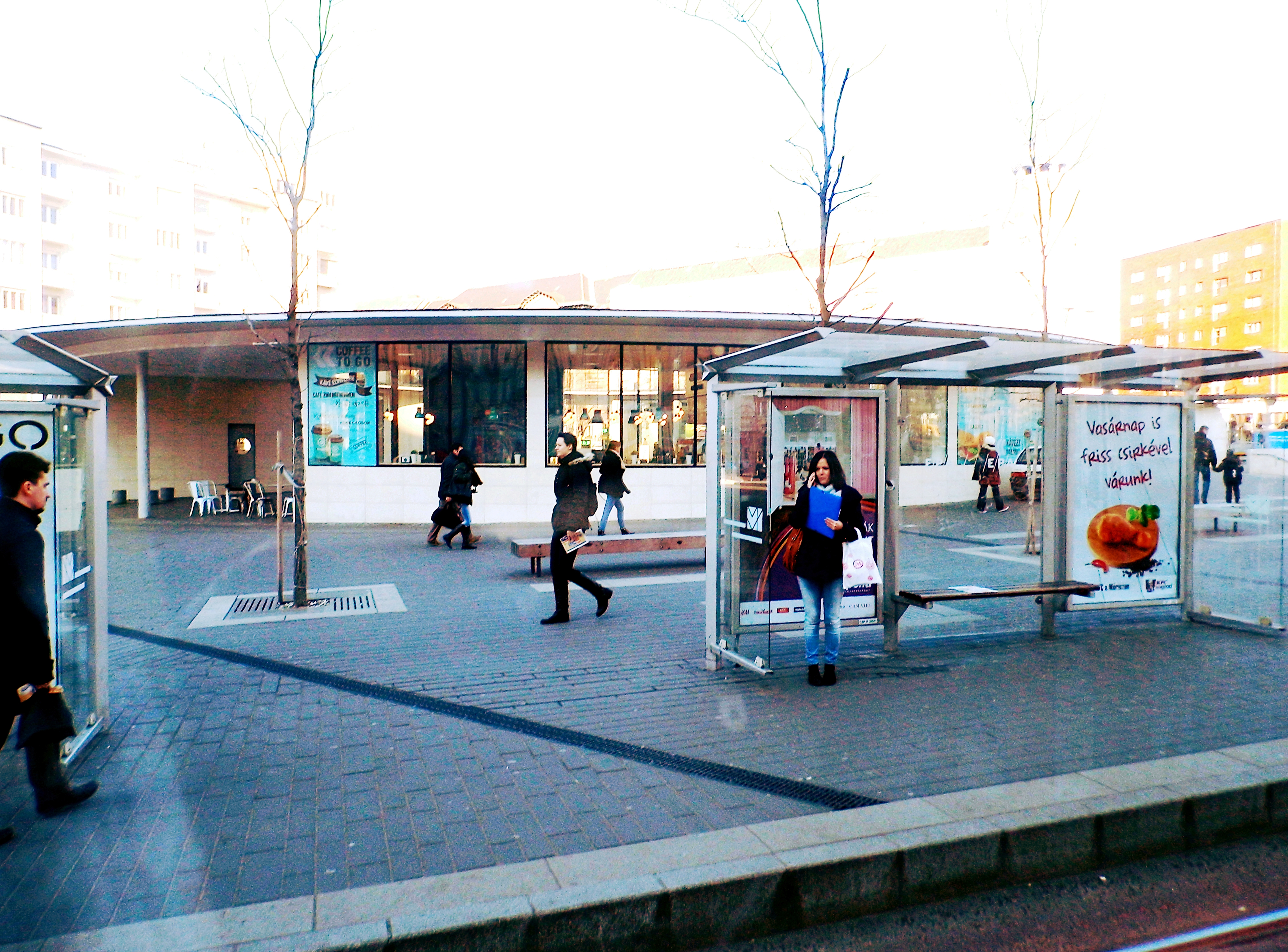 Gomba-épület, Móricz Zsigmond körtér, Budapest XI